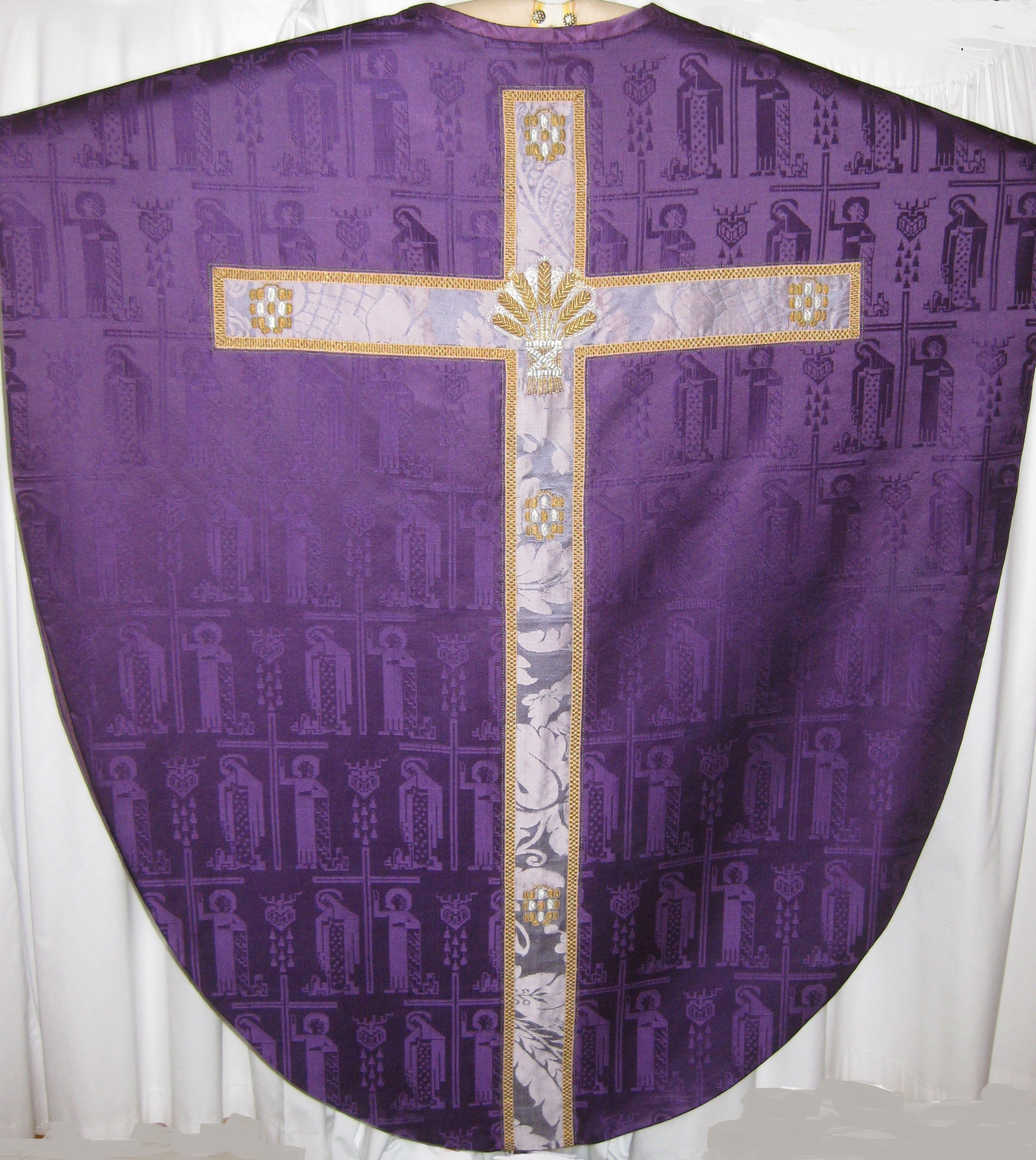 Mässhake formgiven 1951 av Sofia Widén i sidendamast vävd i Vendig av Bealacqua kallad Maria och Johannes (även den formgiven av Widén) med broderat kors på baksidan och texten IHS broderat på framsidan. Mässhaken gjordes för Kristine kyrka i Falin